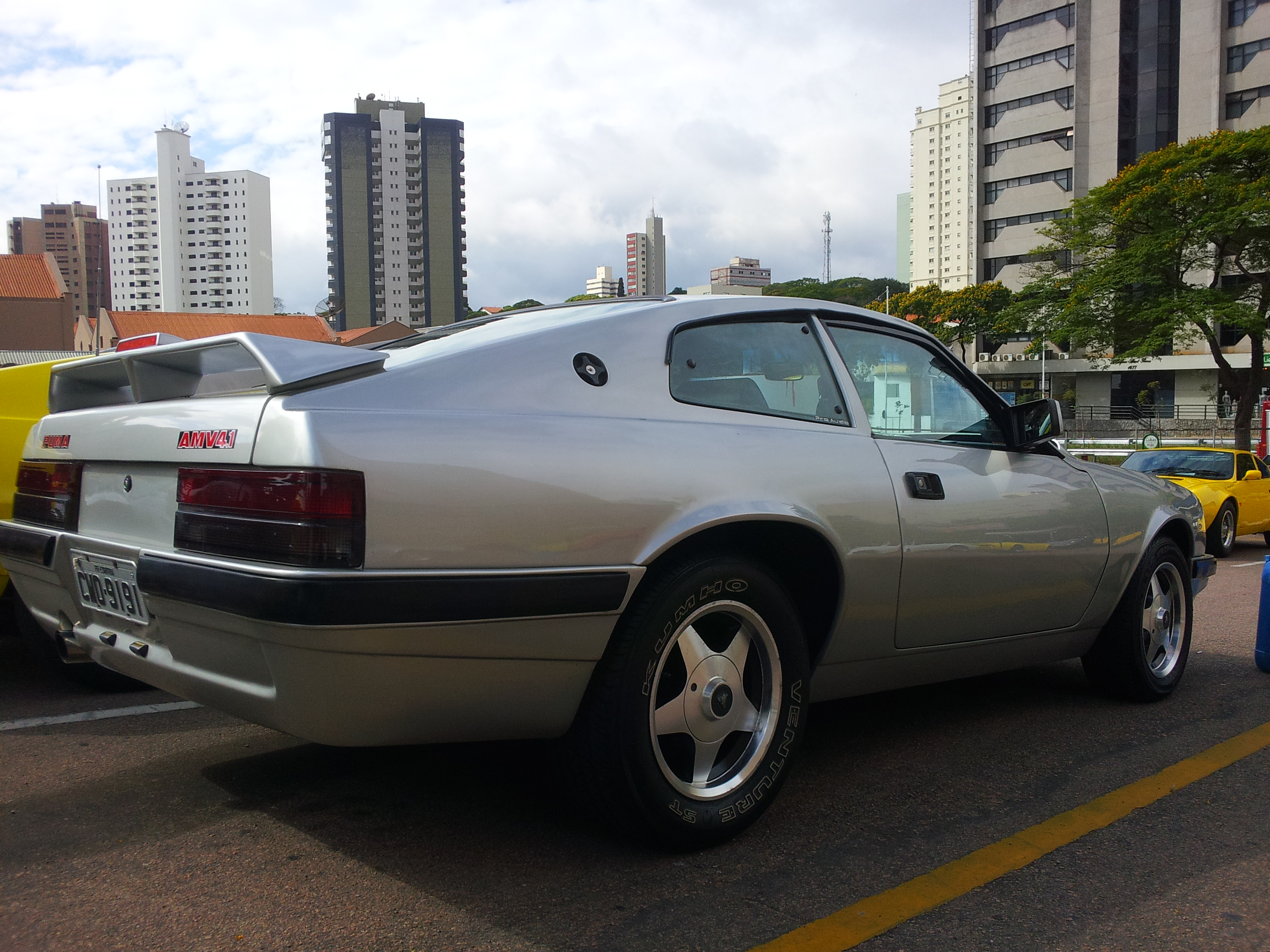 5º encontro Puma Jundiaí 2012_"Bulevar Beco Fino"_Av.Nove de Julho.